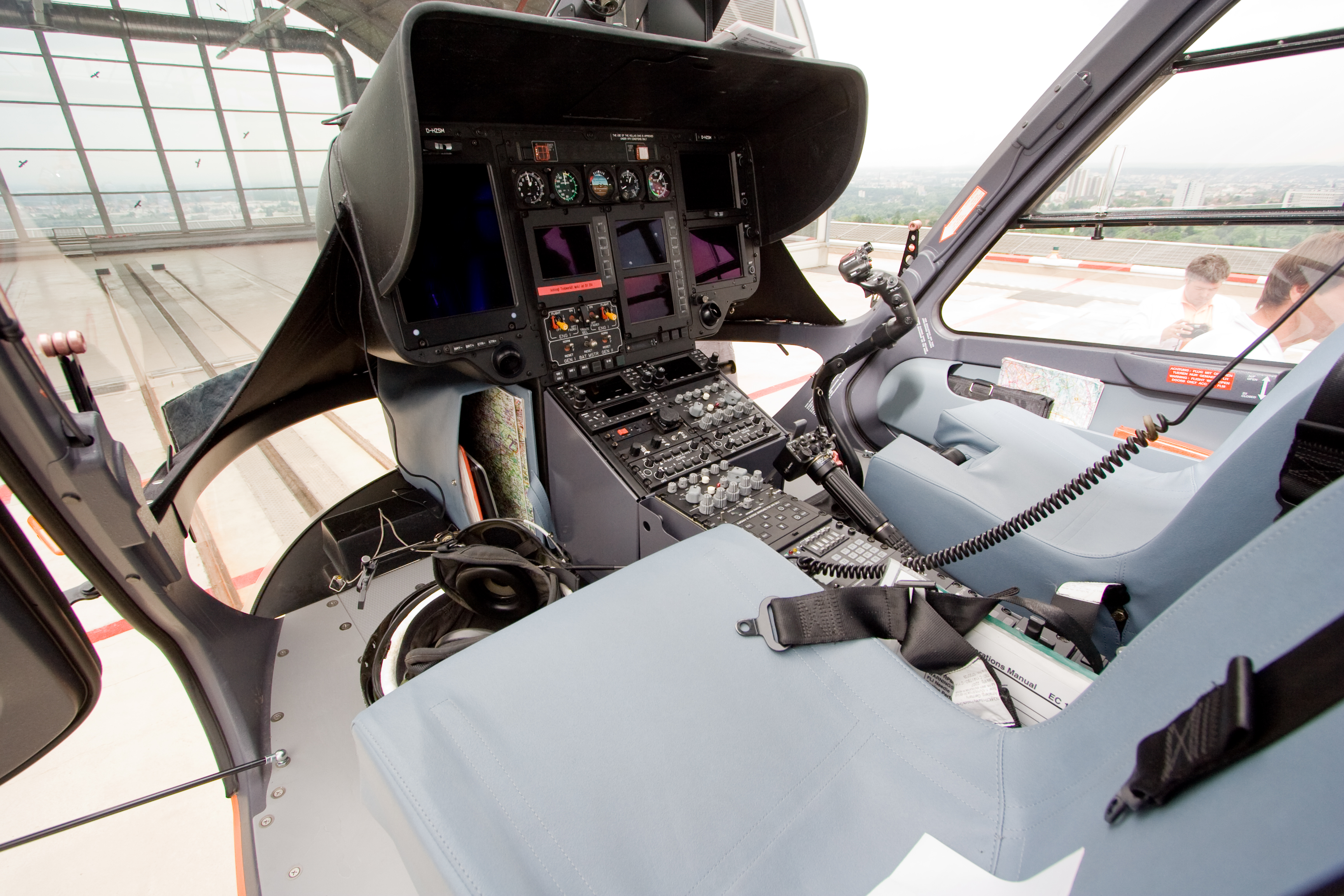 Cockpit eines Rettungsubschraubers des Typs EC 135